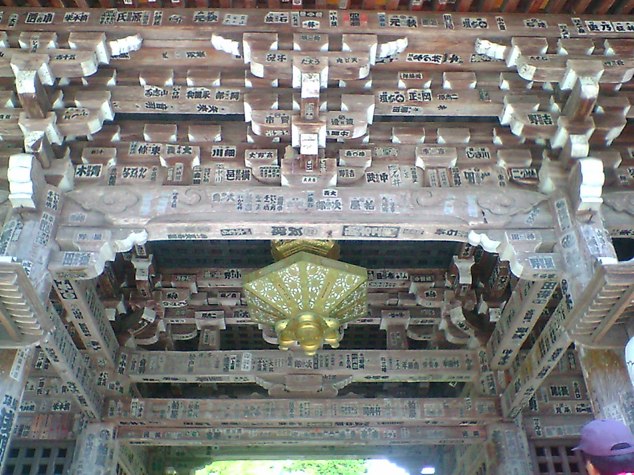 谷汲山華厳寺